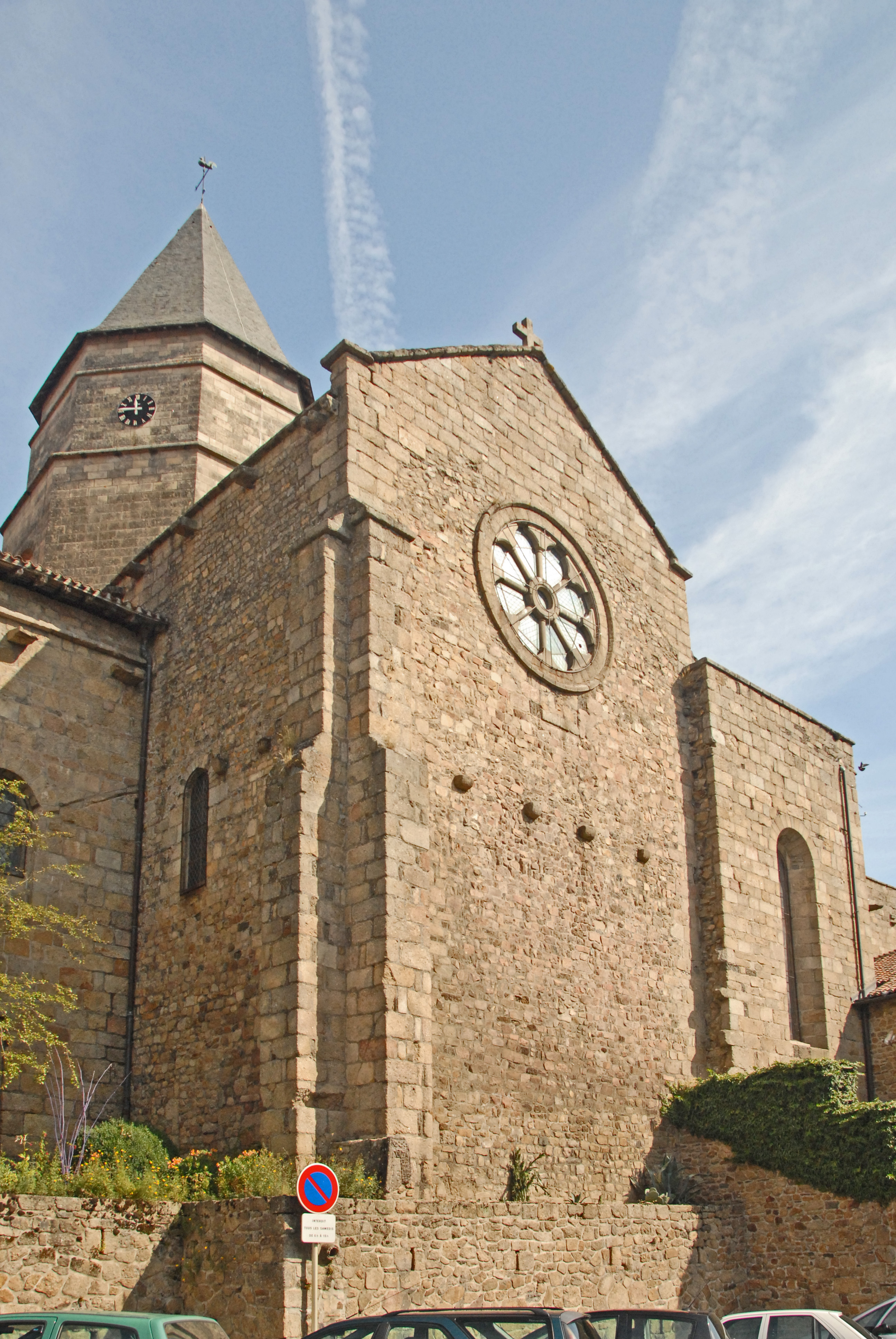 St-Junien, südl. Querhausarm von SW